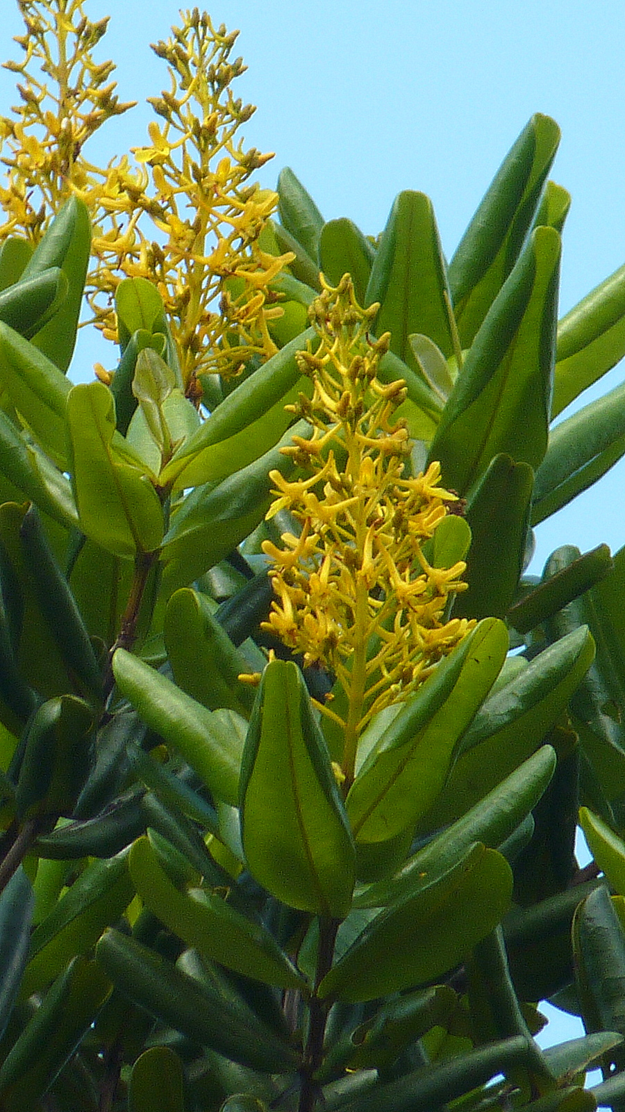 Vochysia lucida C. Presl